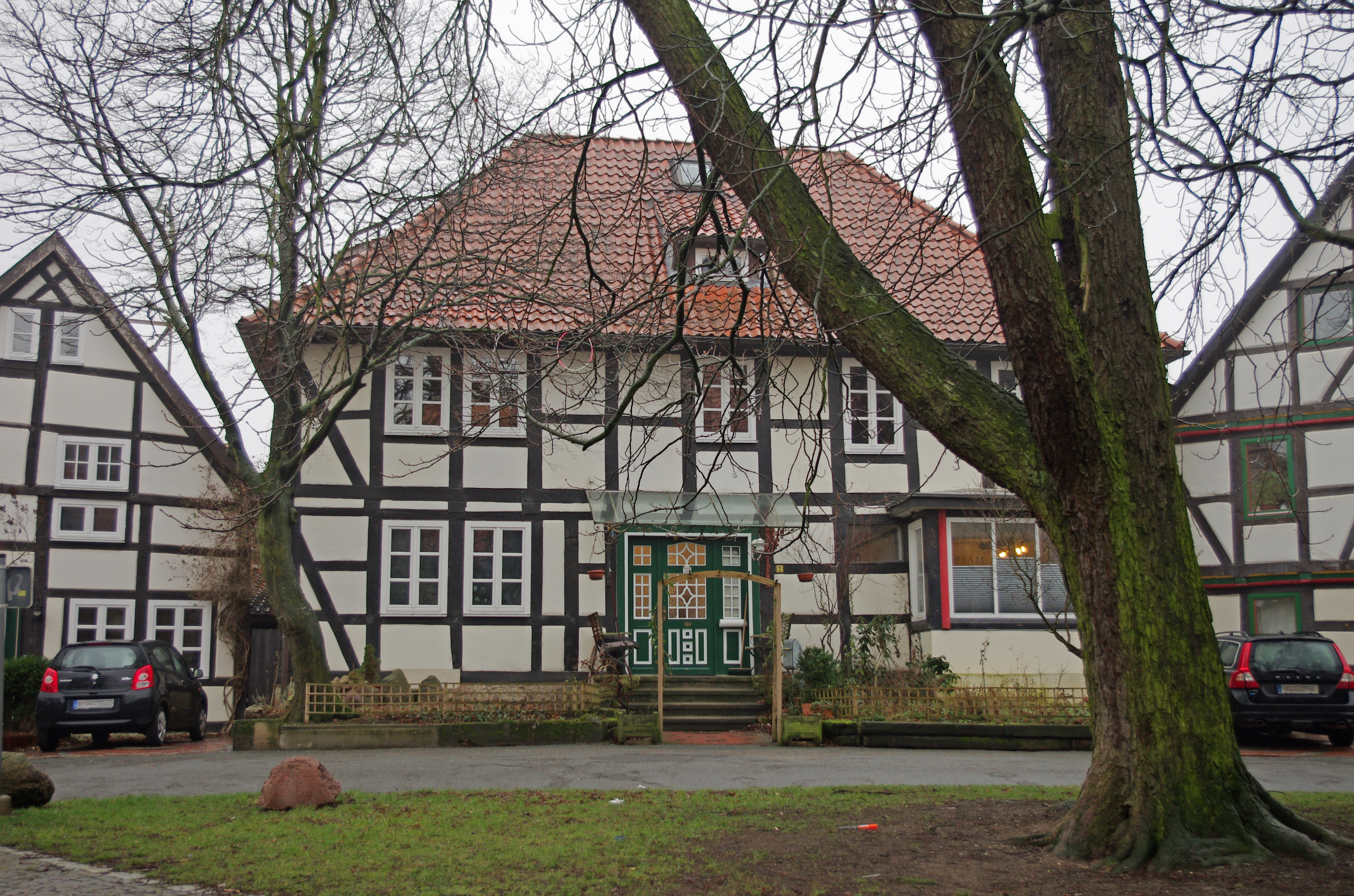 Ronnenberg, Region Hannover in Niedersachsen. Das Haus Am Kirchhof 2 steht unter Denkmalschutz